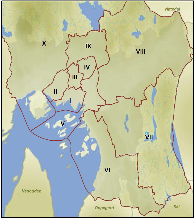 Statistisk årbok for Oslo kommune sin områdeinndeling av Oslo. Her brukes følgende navn om områdene (som ikke må forvekles med adm. bydeler): I Sentrum (sone 01-04), II Indre vest (sone 05-11), III Indre nord-vest (sone 12-25), IV Indre nord (sone 16-20), V Indre øst (sone 21-29 + 57), VI Nordstrand (sone 30-33), VII Østensjøbyen (sone 34-36 + 58), VIII Groruddalen (sone 37-43 + 59), IX Nydalen (sone 44-45), X Vestre Aker og Ullern (sone 46-56 + 60)